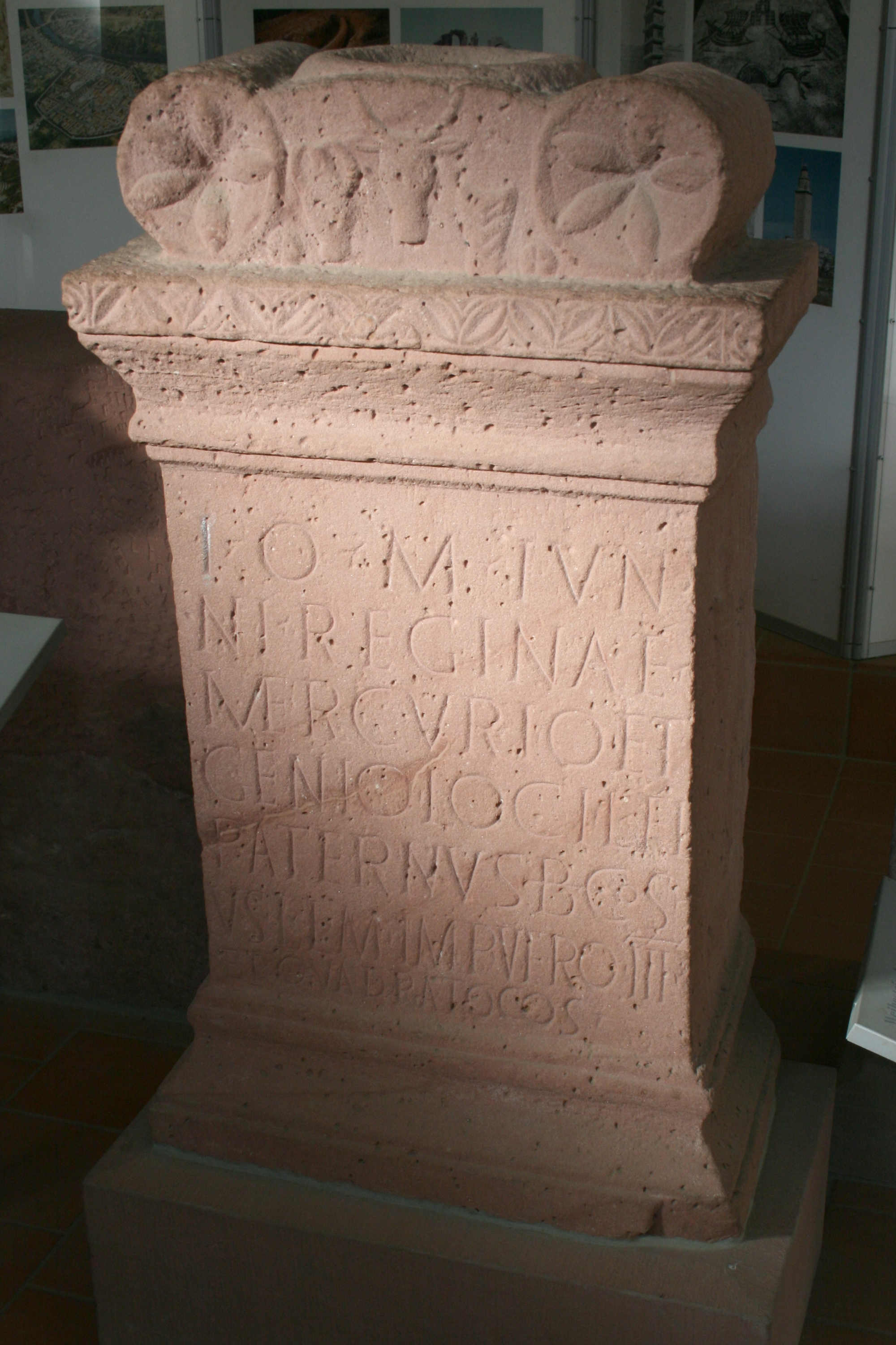 Weihestein eines beneficiarius consularis aus Stockstadt, ausgestellt im Salburgmuseum Bad Homburg. (CIL XIII, 06634)